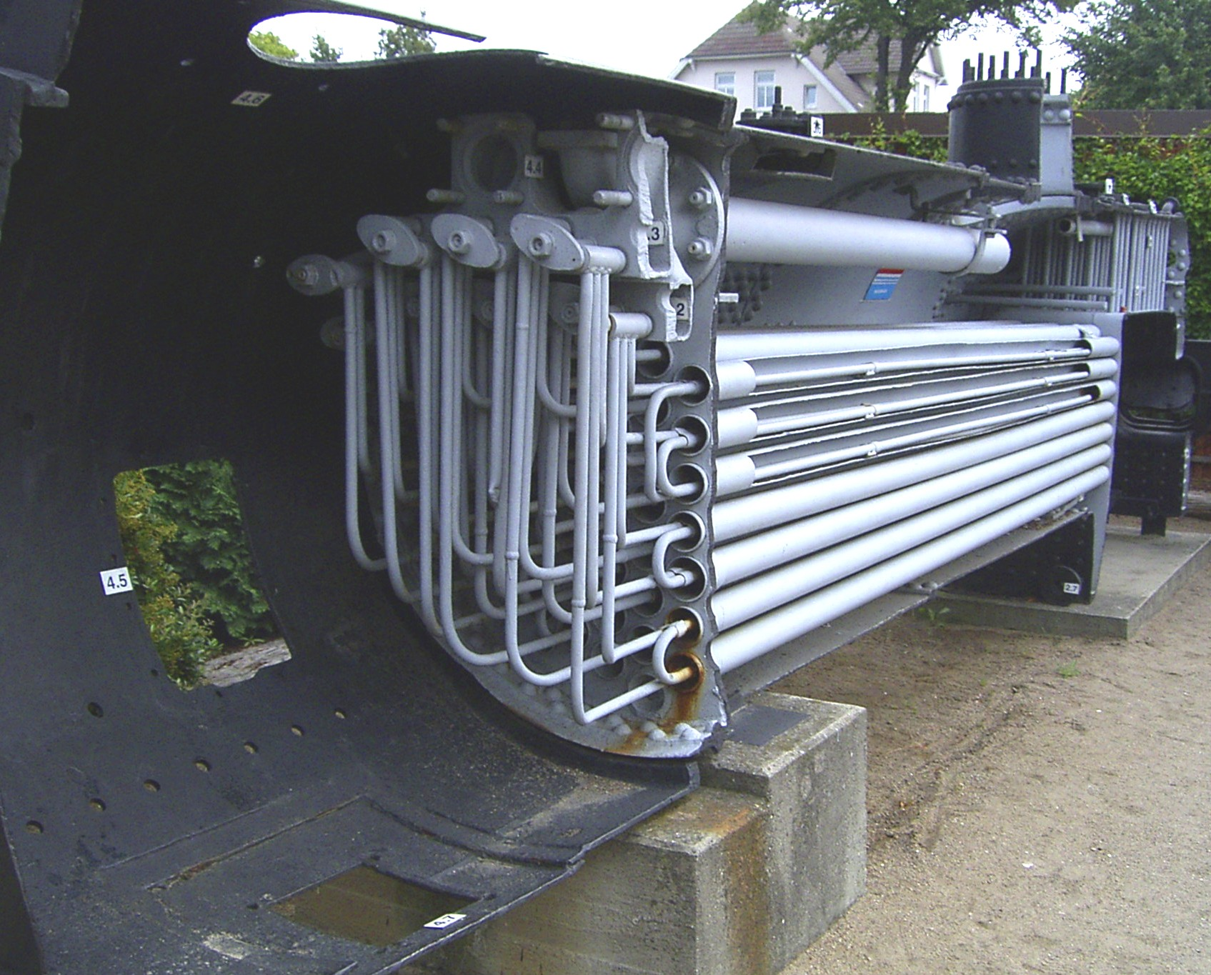 Anschluss der Überhitzerrohre im Rauchkasten eines Schnittmodells des Kessels der Schmalspurlokomotive 99 323. Gebaut von Orenstein und Koppel in Potsdam-Drewitz 1932. Zu erkennen Nassdampfkammer (2), Heißdampfkammer (3), Ausschnitte für Einströmrohr (4.5) Schornstein (4.6), Standrohr (4.7)